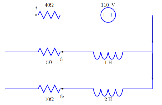 Circuito de duas malhas para exemplificar a sua resolução por Transformada de Laplace